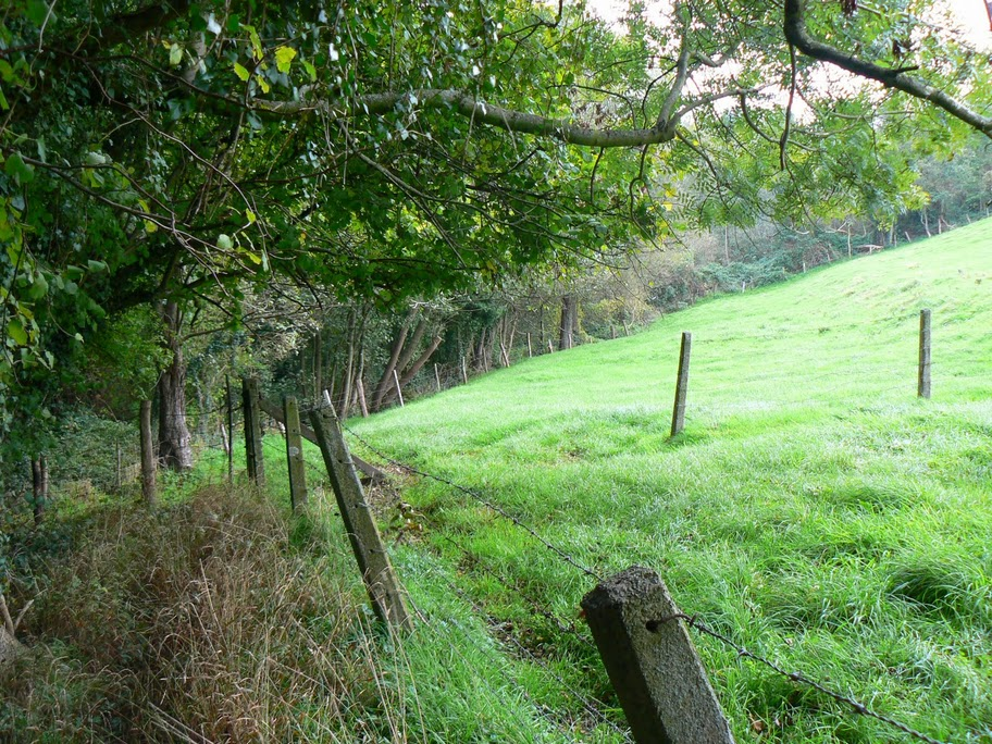 zicht op weide (deel van 2 ha natuurgebied)